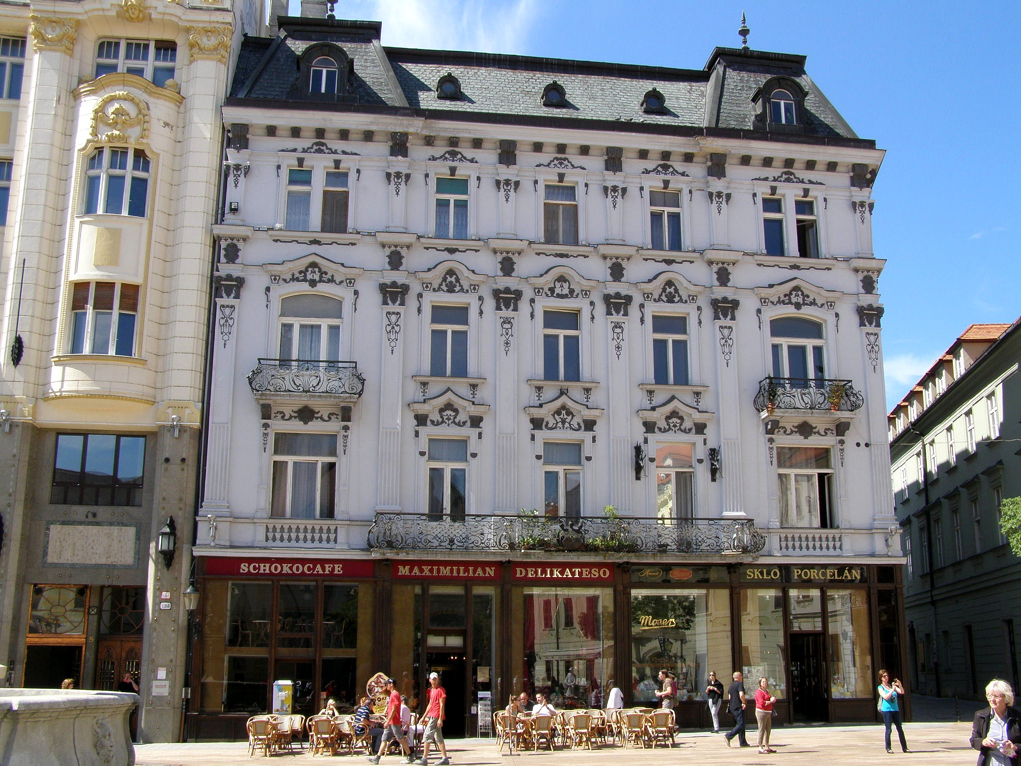 Palugyayov palác na Hlavnom námestí v Bratislave; celkový pohľad. Budovu v eklektickom slohu si dal v rokoch 1882 - 1883 postaviť František Palugyay podľa projektu známeho bratislavského architekta Viktora Rumpelmayera